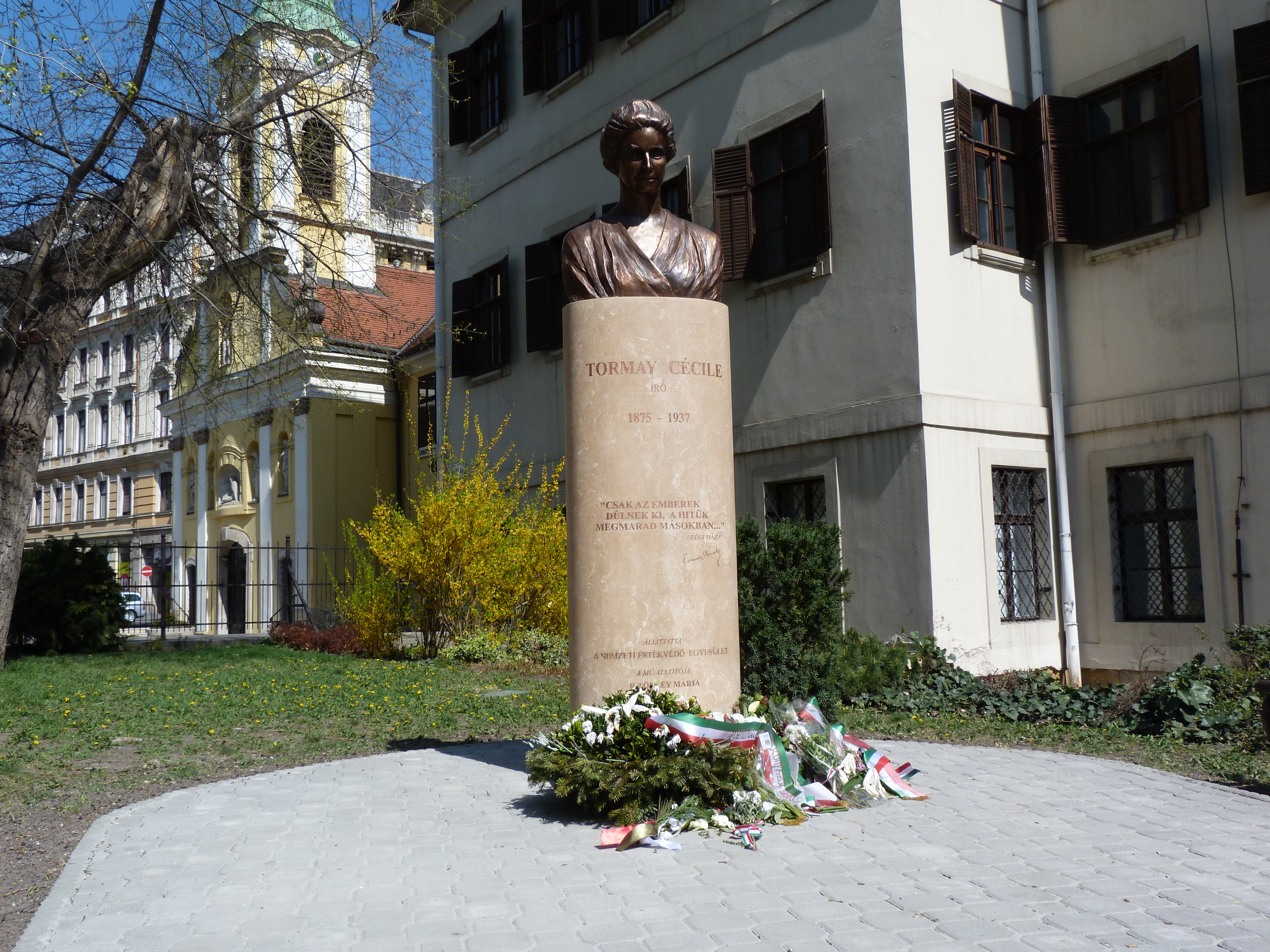 A felvétel 2012. április hó 3 -án, kedden készült Budapesten, a Szent Rókus Kórház előtti parkban. Tormay Cécile írónő (1875 - 1937) szobrát 2012. március hó 31 -én, szombaton avatták fel (1, 2). Tormay Cécil a közeli Kőfaragó utca 3 szám alatti házban lakott (Józsefváros), ahol a közelmúltban helyreállították 1945 -ben elpusztított emléktábláját (3, 4)